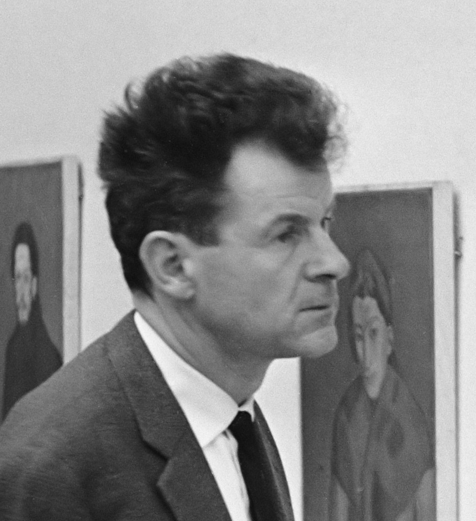 Picasso-tentoonstelling in Stedelijk Museum, Jean Leymarie bij enige schilderijen 3 maart 1967